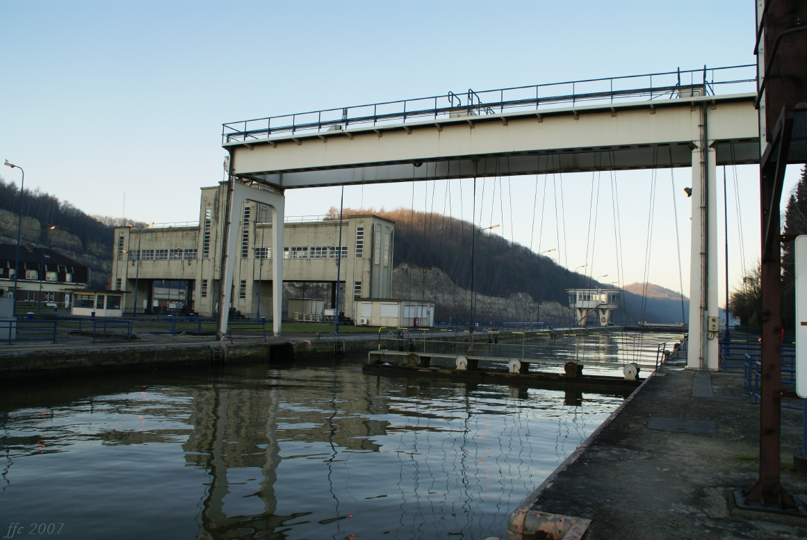 Rescloses 1,2 i 3 al Canal de Lanaye a Lanaye (Visé), Bèlgica